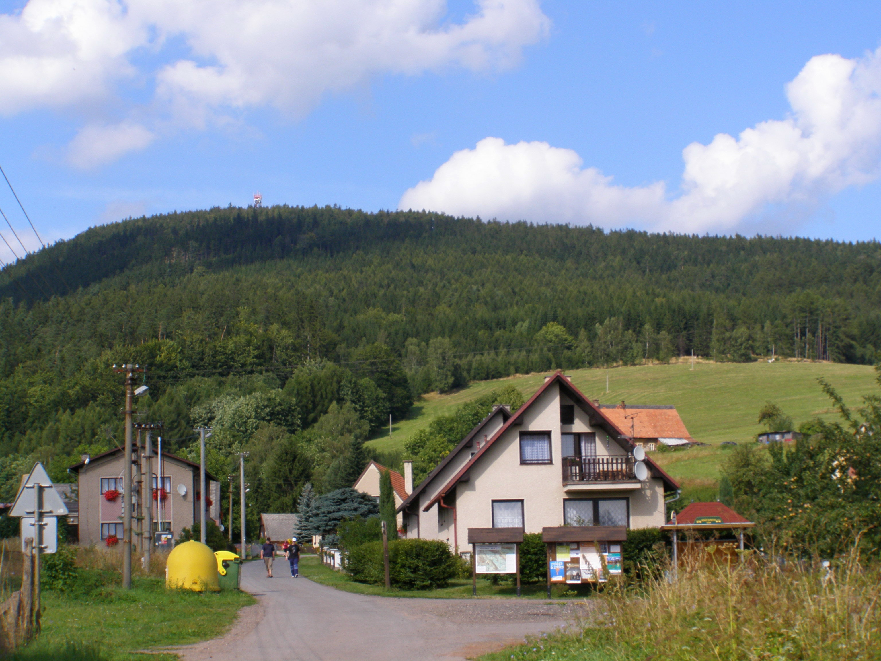 Ruprechtice (Meziměstí), v pozadí Ruprechtický špičák